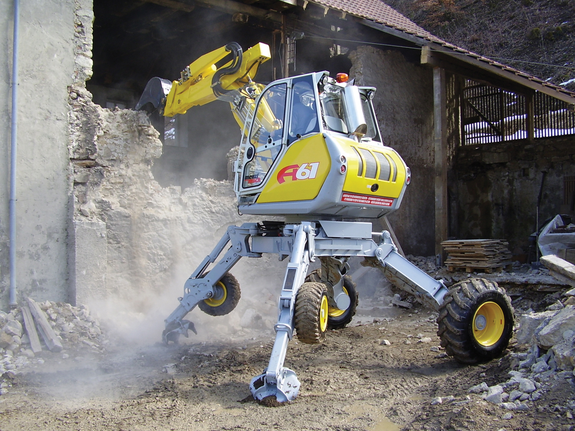 Schreitbagger Menzi Muck A61 beim Gebäudeabbruch.